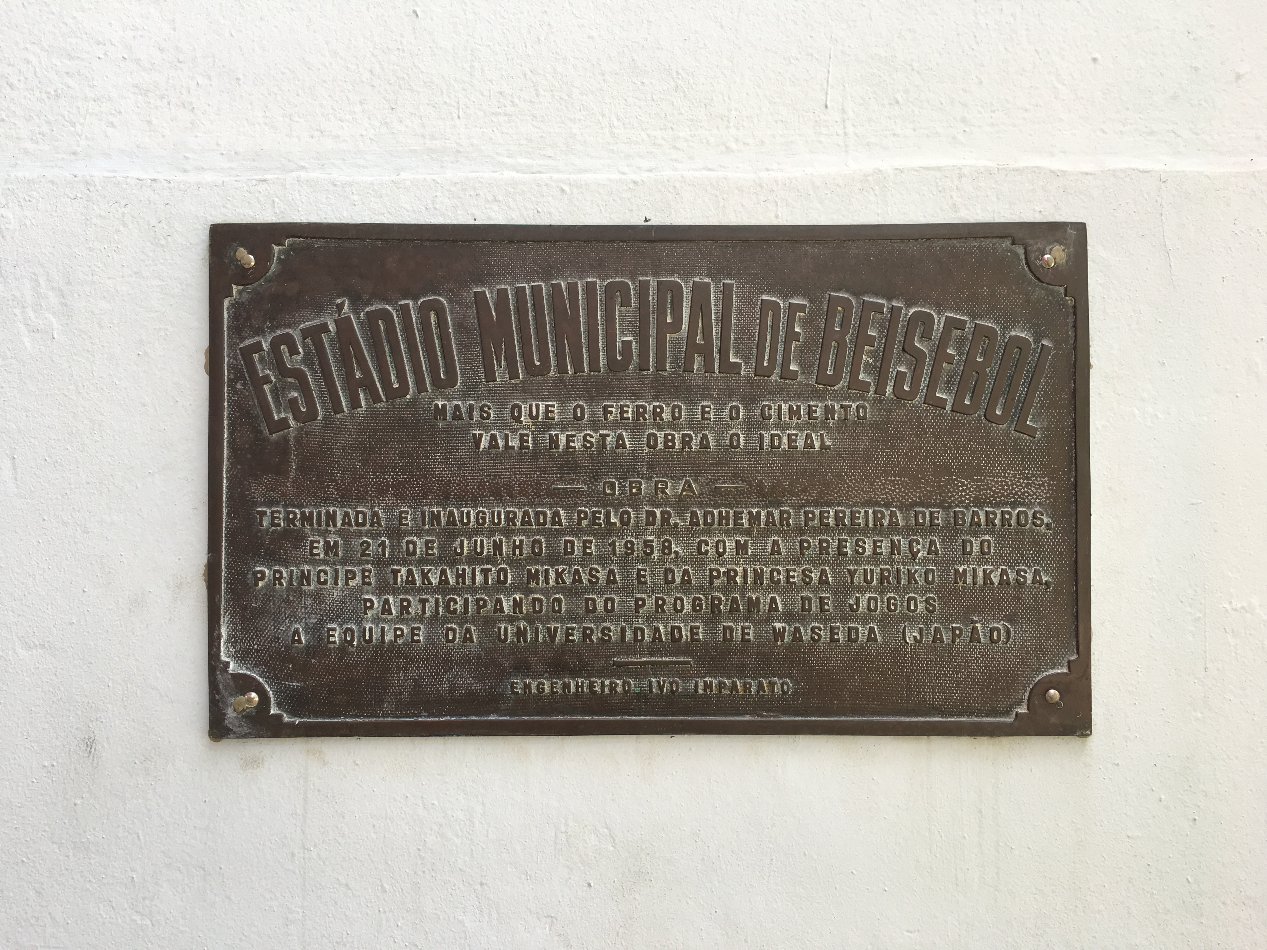 Placa feita pela prefeitura de São Paulo quanto à abertura do Estádio Municipal de Beisebol Mie Nishi, em São Paulo (SP), localizada dentro do estádio.